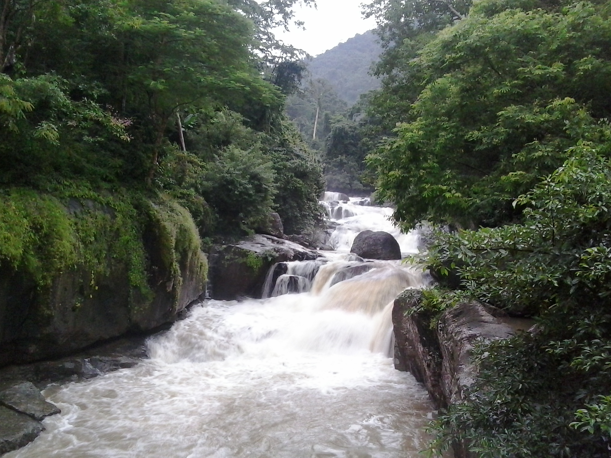 น้ำตกนางรอง